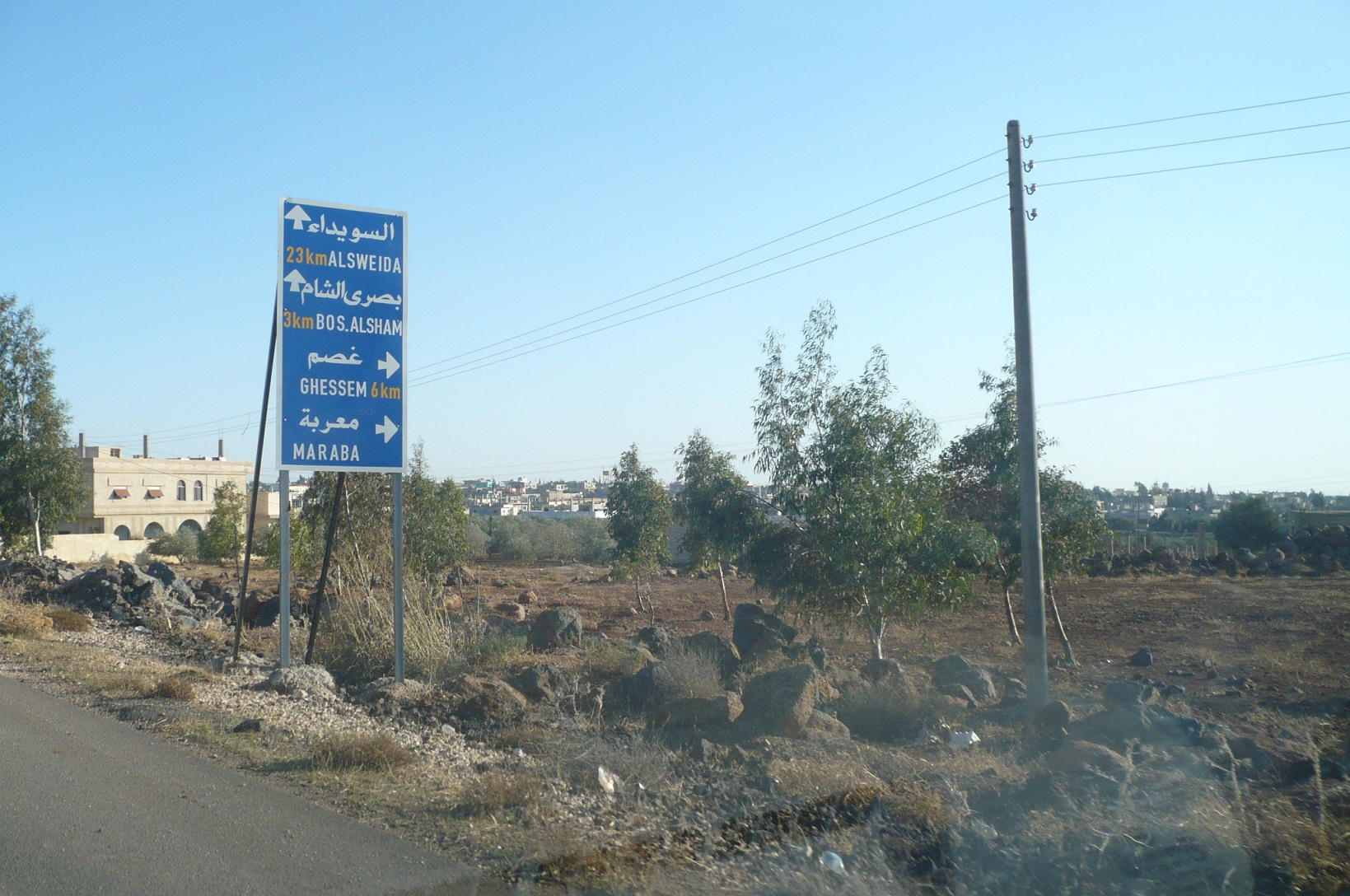 صورة لبلدة معربة السورية توضح المسافات مع المدن والبلدات القريبة.